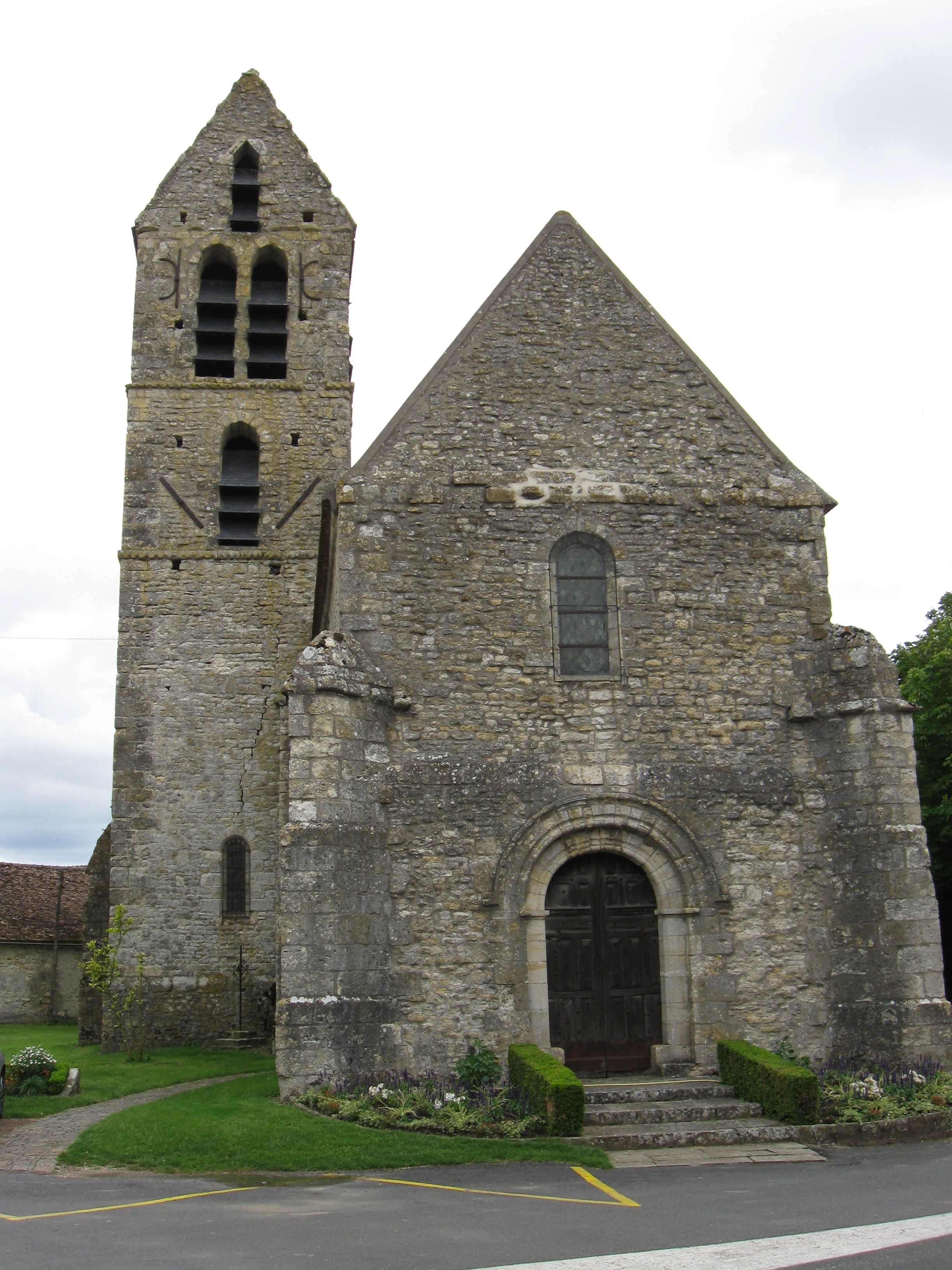 Église catholique Saint-Martin. (Fromont, département de la Seine et Marne, région Île-de-France).